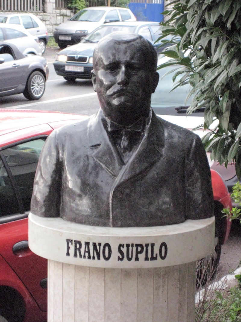 Frano Supilo, Rijeka, uz zgradu Novog lista